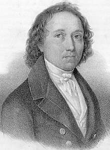 Johann Georg Wirth (1798–1848), Publizist